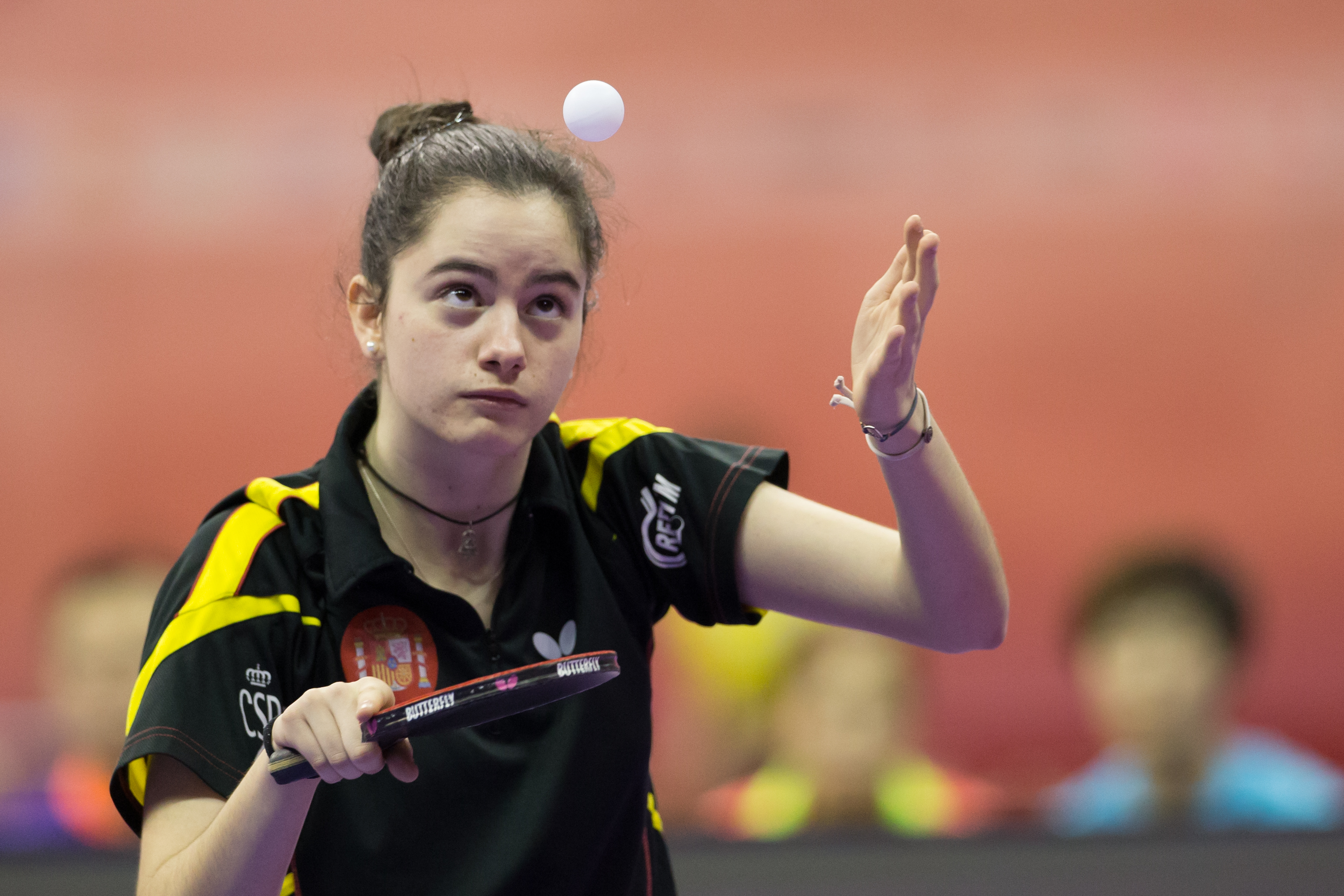 _K0K8687